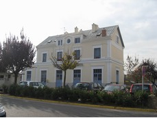 Le bâtiment voyageurs (du à Alexis Cendrier en 1854) et le parvis de la gare de Saint-Georges-de-Reneins.